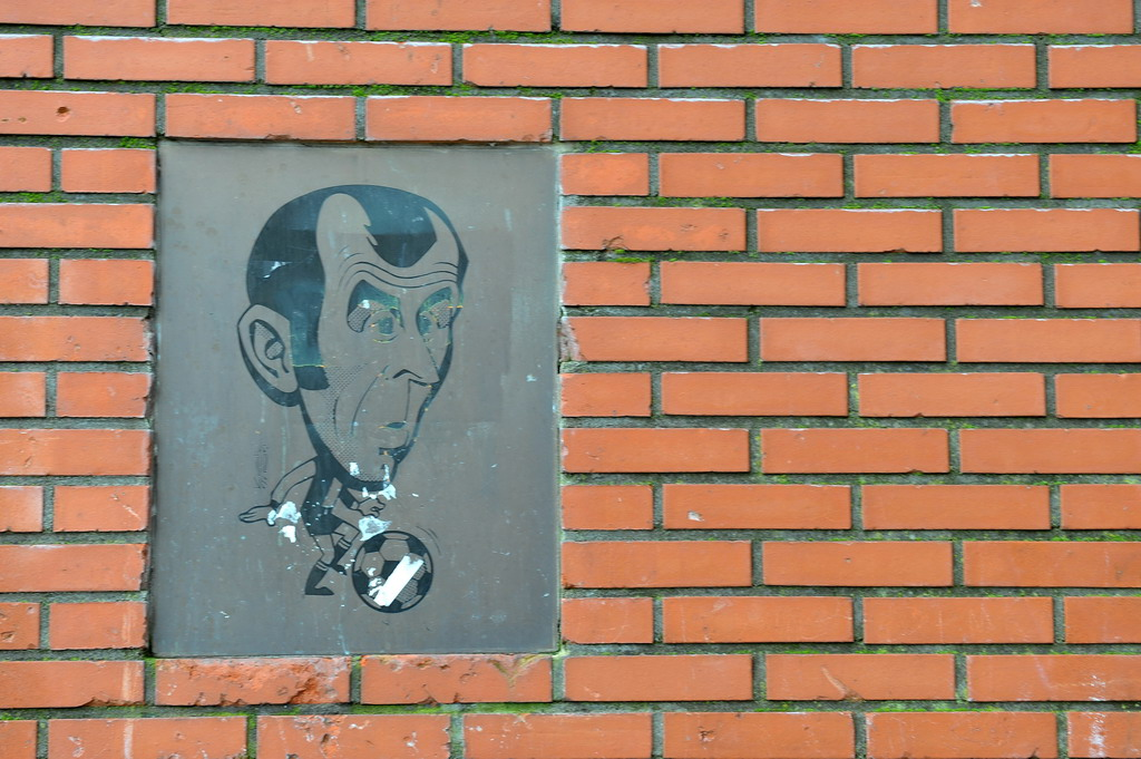 Moulijn groeide op in de Bloklandstraat in het Oude Noorden van Rotterdam. Het muurtje waar hij in zijn jeugd eindeloos tegenaan had gevoetbald, was befaamd maar viel in de jaren zeventig ten prooi aan de stadsvernieuwing. In 1990 is elders in dezelfde straat een speelplaats voorzien van een 'nepmuur' van Coen Moulijn, ontworpen door de kunstenaar Hans Citroen. Bron Wikipedia.